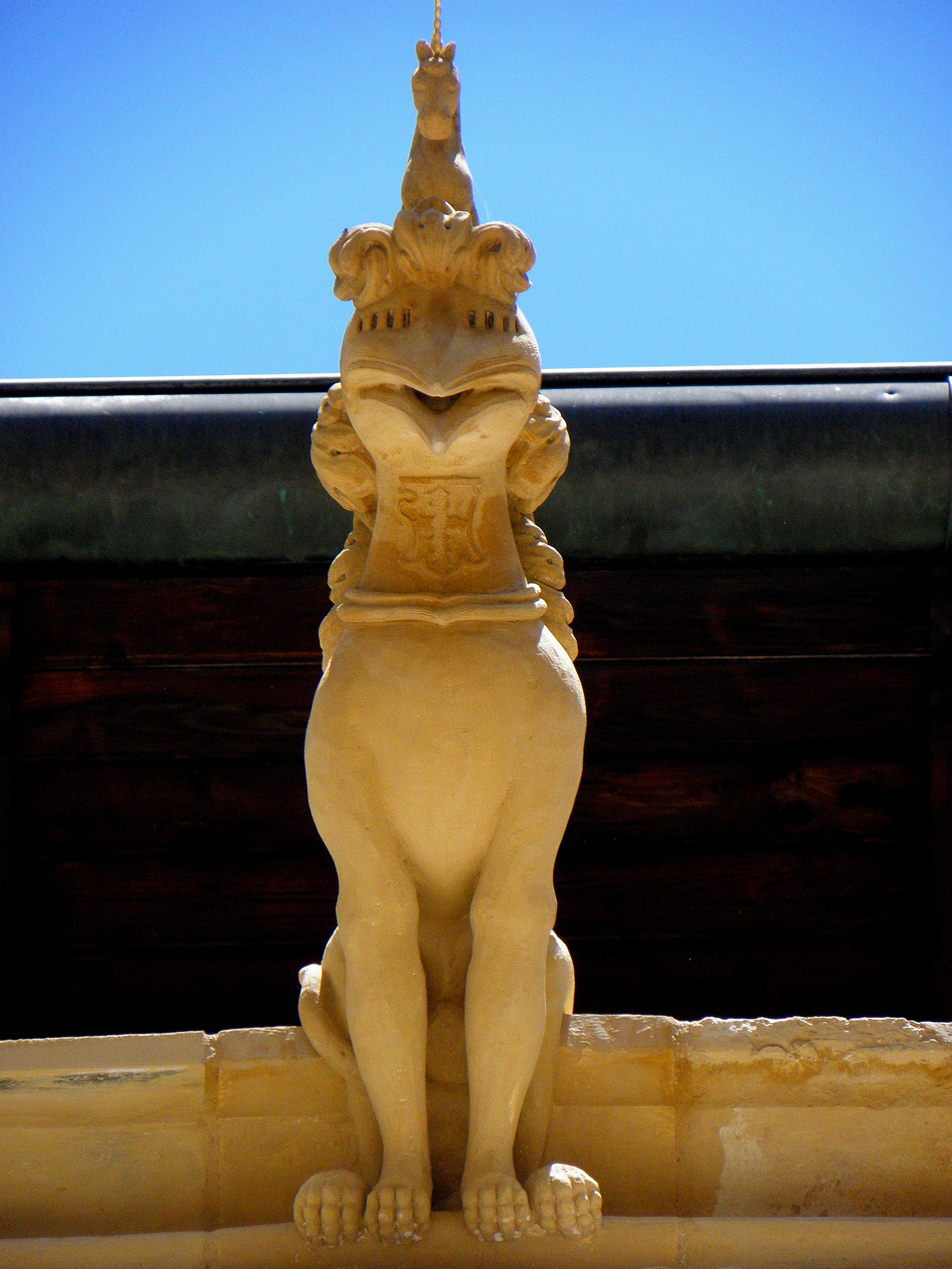 Hôtel de Gadagne, Lyon 5ème (69). .